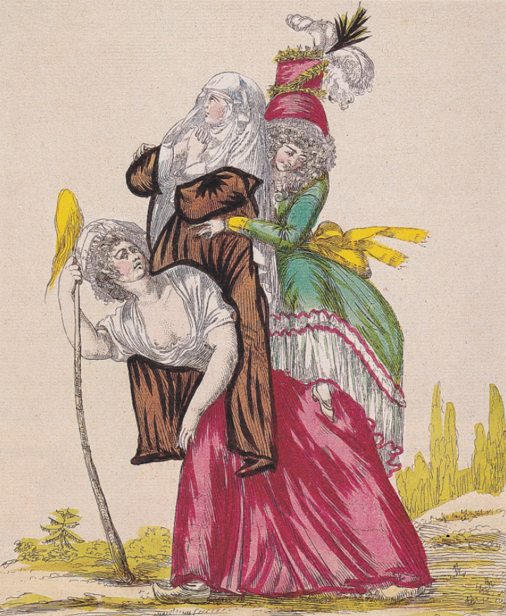 Deutsch u. a. mit der Überschrift "Der große Missstand". Es handelt sich dabei um eine Radierung eines unbekannten Künstlers aus dem Jahr 1789.